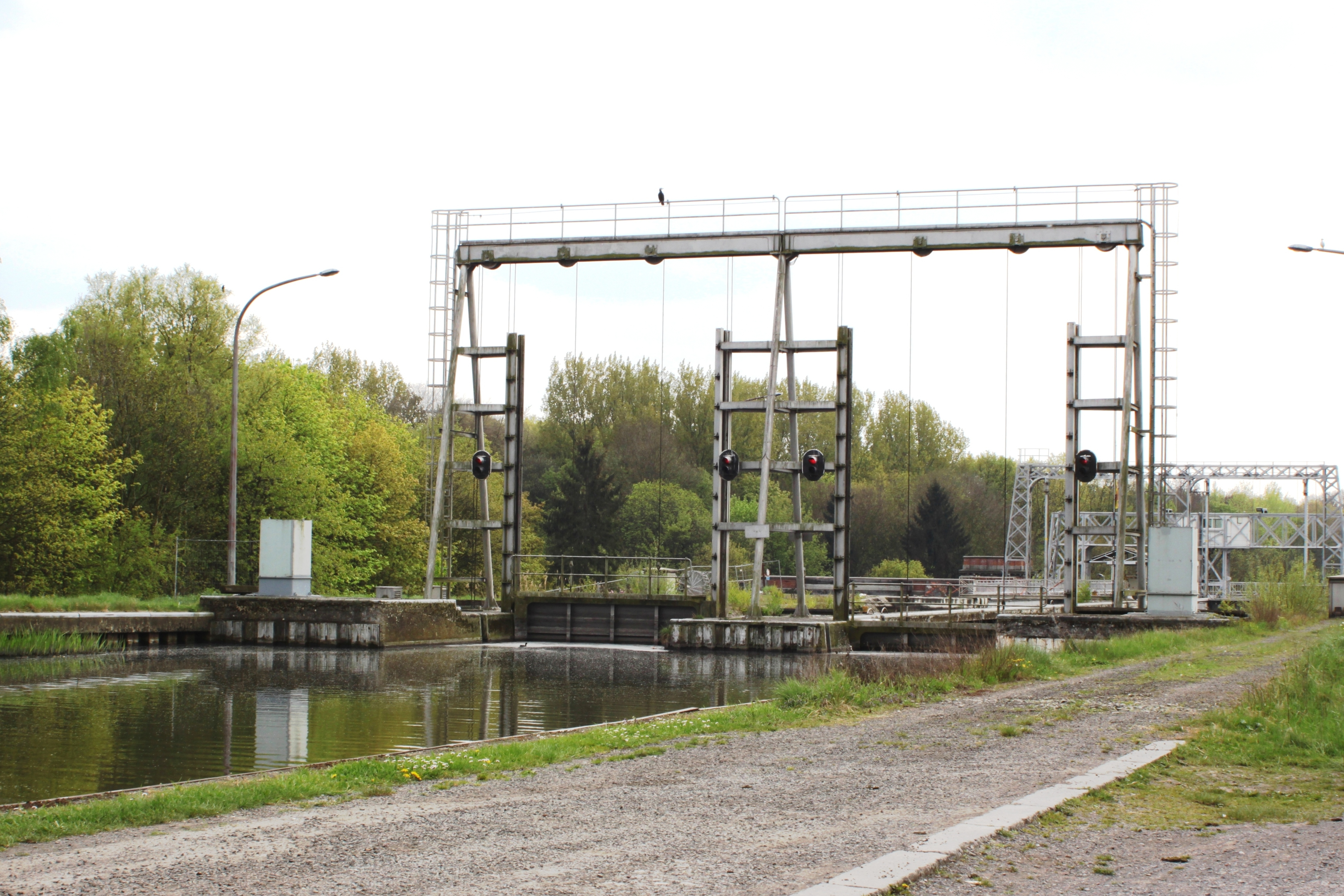 Partie du bief de partage et porte de garde de l'ascensceur N°1 du Canal du Centre (Belgique)